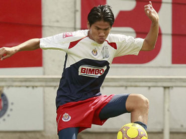 Juan Antonio Ocampo - Entrenamiento de Club Deportivo Guadalajara